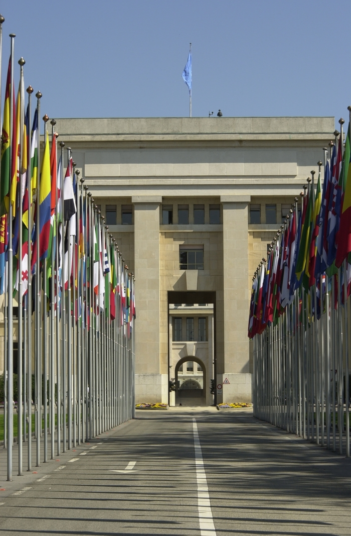 Bâtiment de Genève